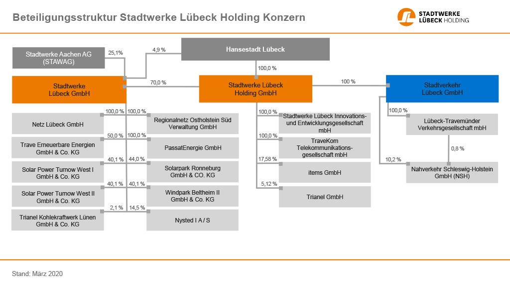 Beteiligungsstruktur der Stadtwerke Lübeck Holding GmbH